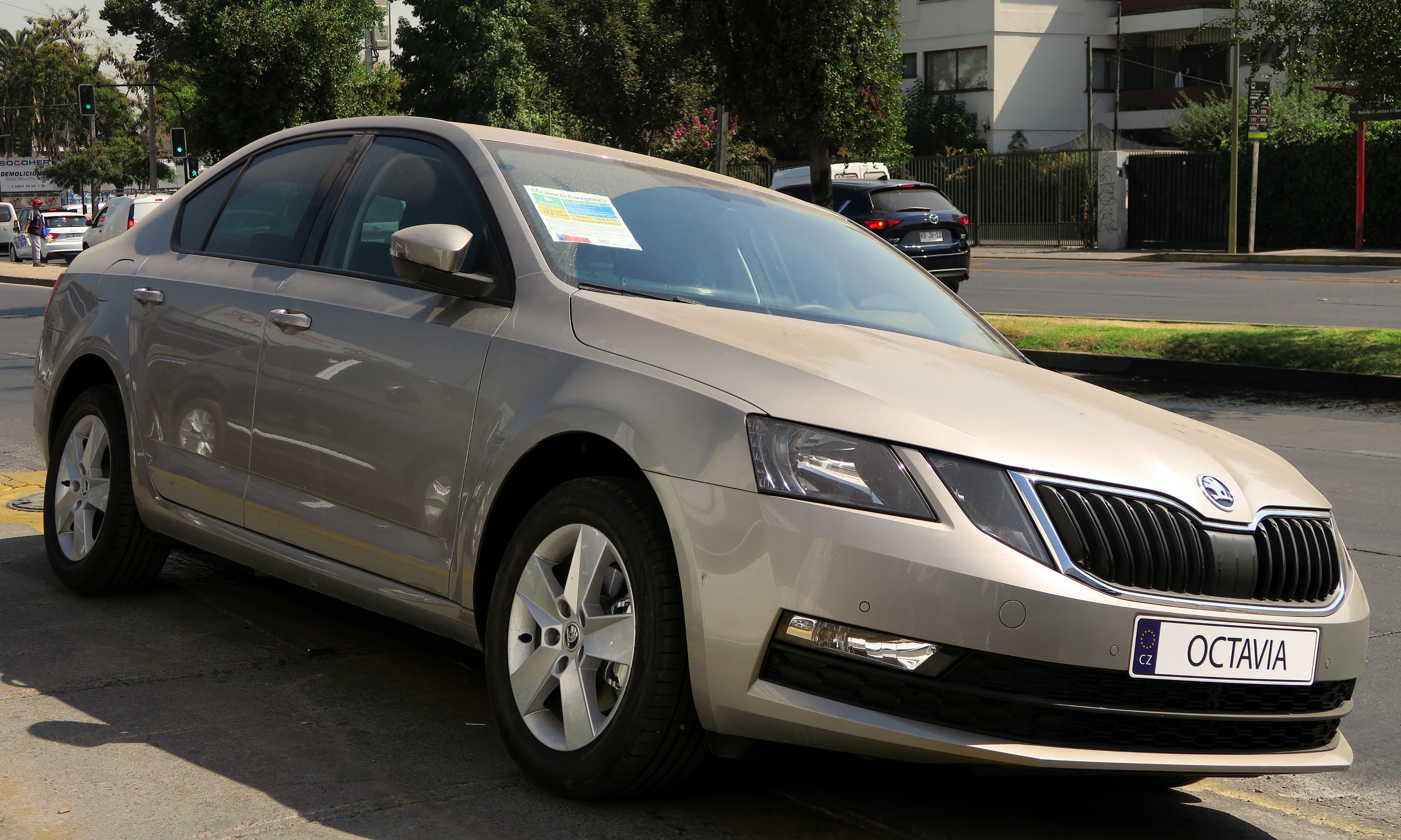 Skoda Octavia 1.4 TSi Ambiente 2018